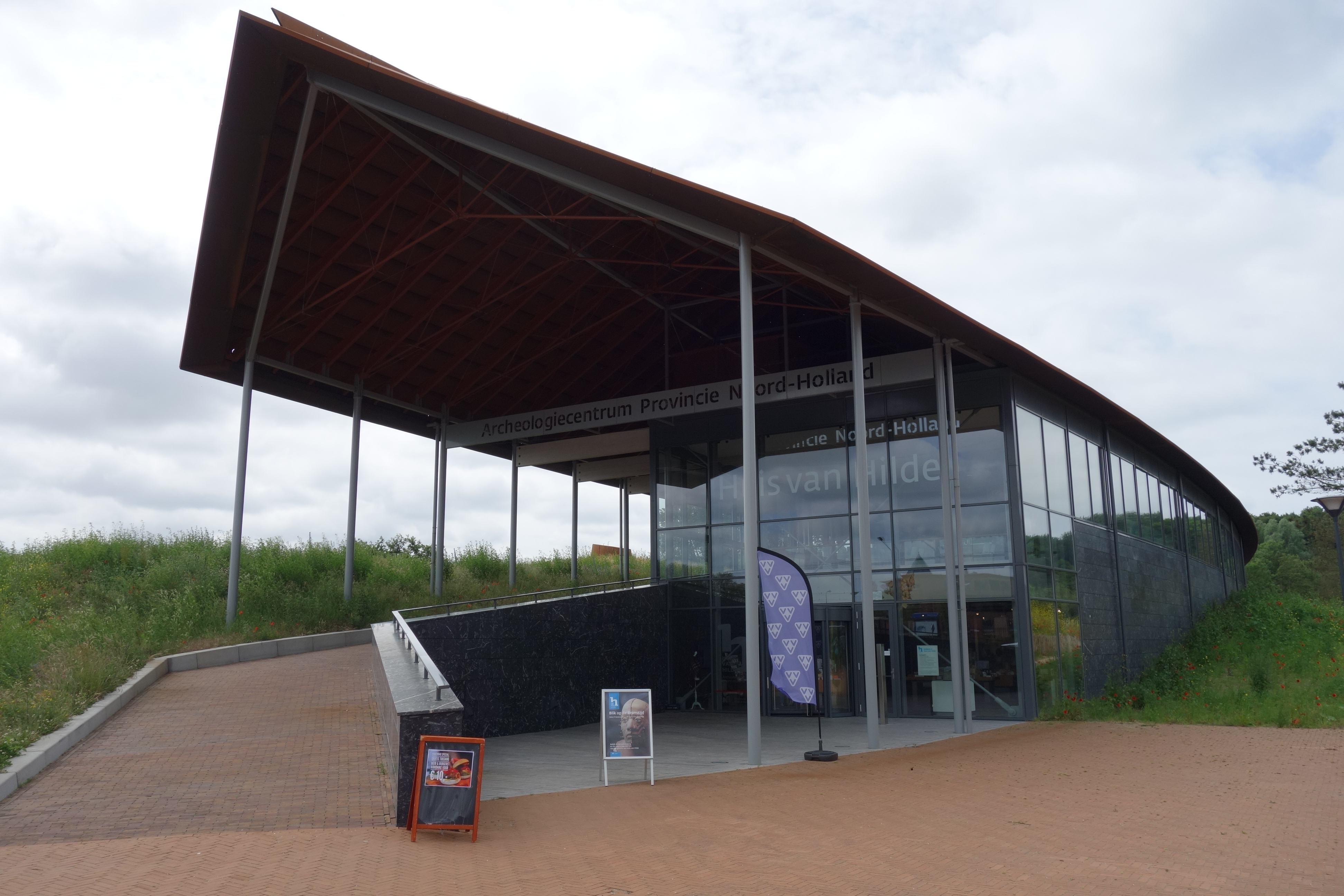 Het archeologisch centrum van Noord-Holland: Huis Hilde, in Castricum. Het centrum is zowel een opslag als tentoonstellingsruimte van archeologische vondsten uit de provincie Noord-Holland.